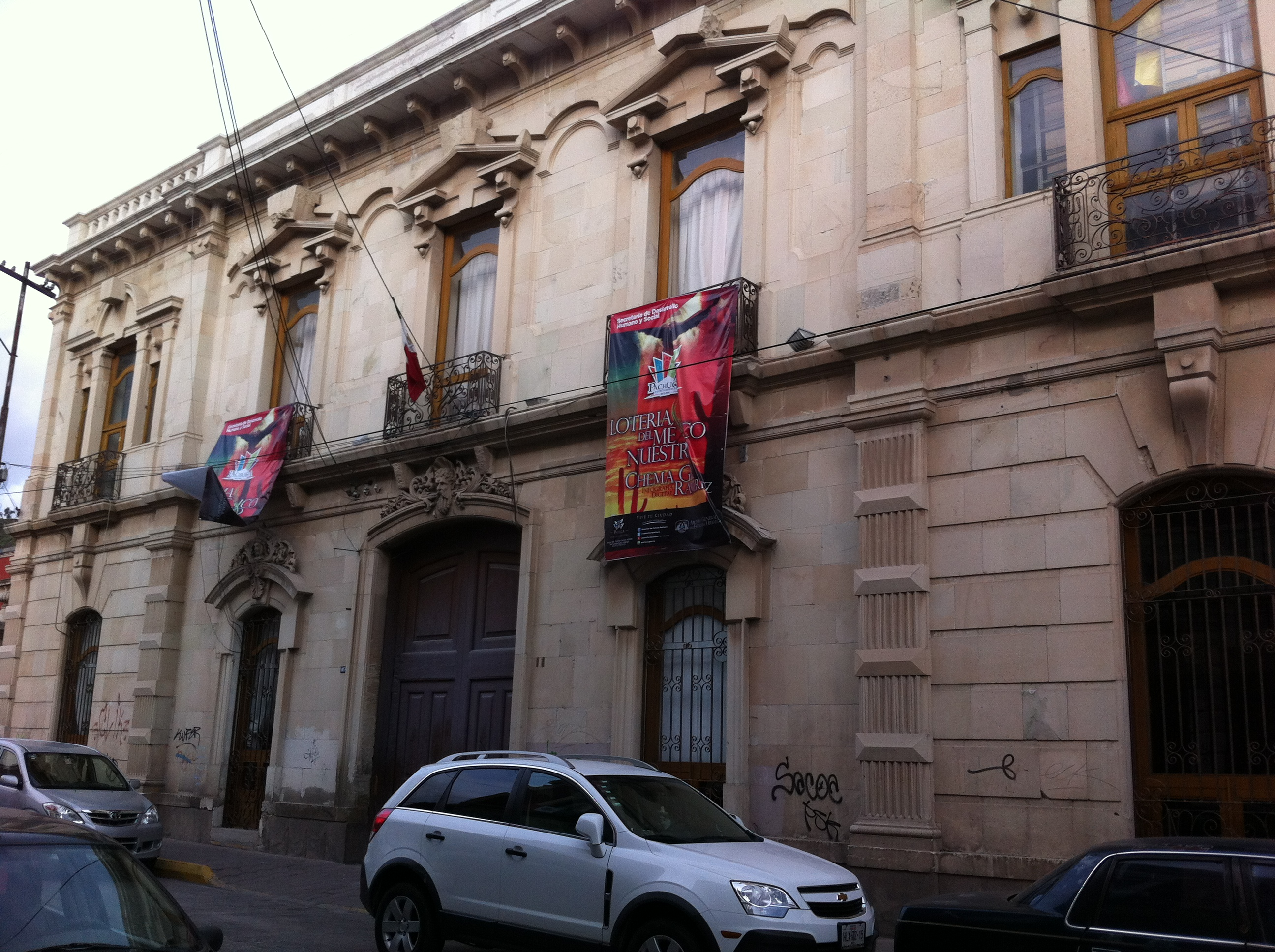 Archivo General del Estado de Hidalgo — Pachuca Centro, México.